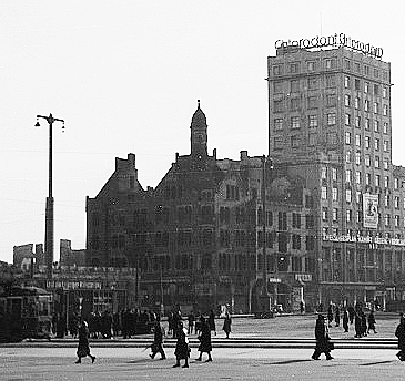 Leipzig: Zerstörtes Niederländisches Haus, Augustusplatz 8